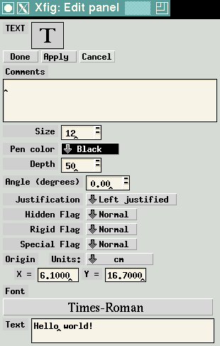 Screenshot eines Dialogs in dem Programm Xfig zur Demonstration eines Zirkumflex (Caret) als Schreibmarke